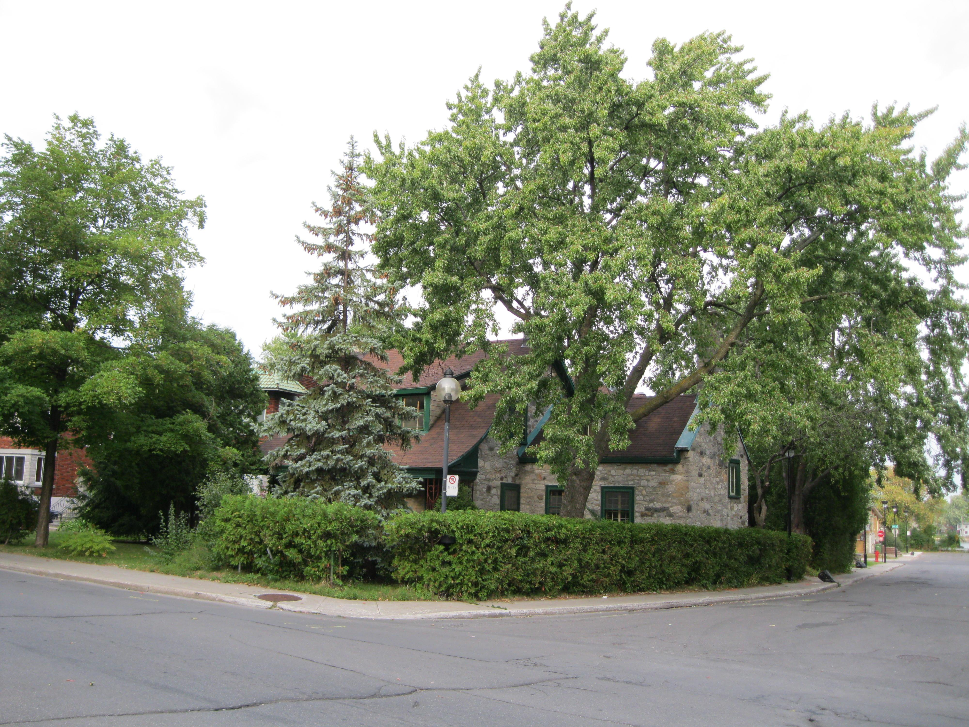 La maison Joseph-Dagenais, construite en 1825, est située au 337 Gouin est, à l'intersection de la rue Saint-Denis, dans l'arrondissement de Ahuntsic-Cartierville, à Montréal. Wikimapia